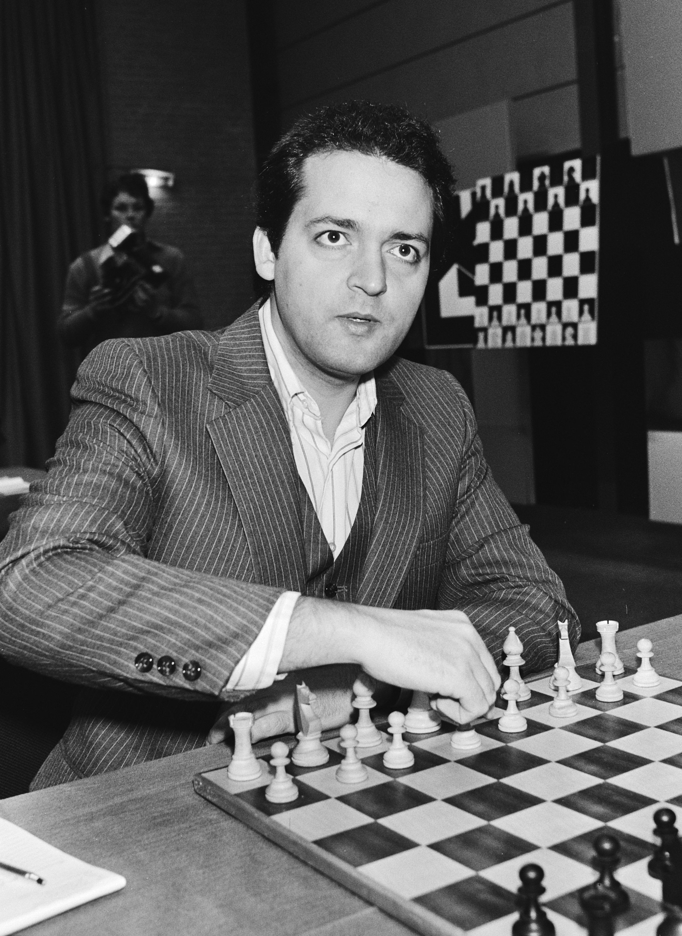 Collectie / Archief : Fotocollectie Anefo Reportage / Serie : [ onbekend ] Beschrijving : Hoogovenschaaktoernooi, 1e ronde ; Peter Biyiasas playing Walter Browne Datum : 15 januari 1980 Trefwoorden : schaken Instellingsnaam : Hoogovenschaaktoernooi Fotograaf : Suyk, Koen / Anefo Auteursrechthebbende : Nationaal Archief Materiaalsoort : Negatief (zwart/wit) Nummer archiefinventaris : bekijk toegang 2.24.01.05 Bestanddeelnummer : 930-6227